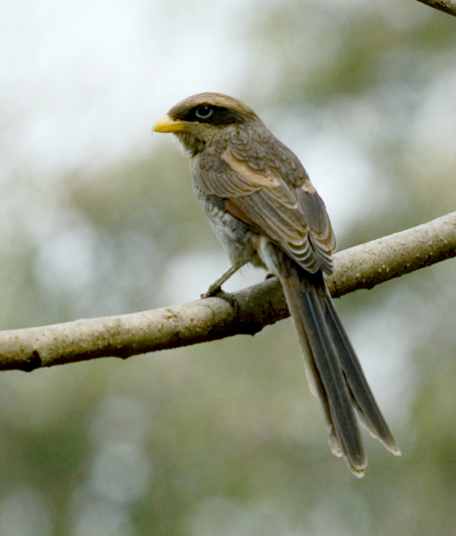 ID'd by Martin . Pic taken @ Park Hann, near Dakar, Senegal. Wiki Entry